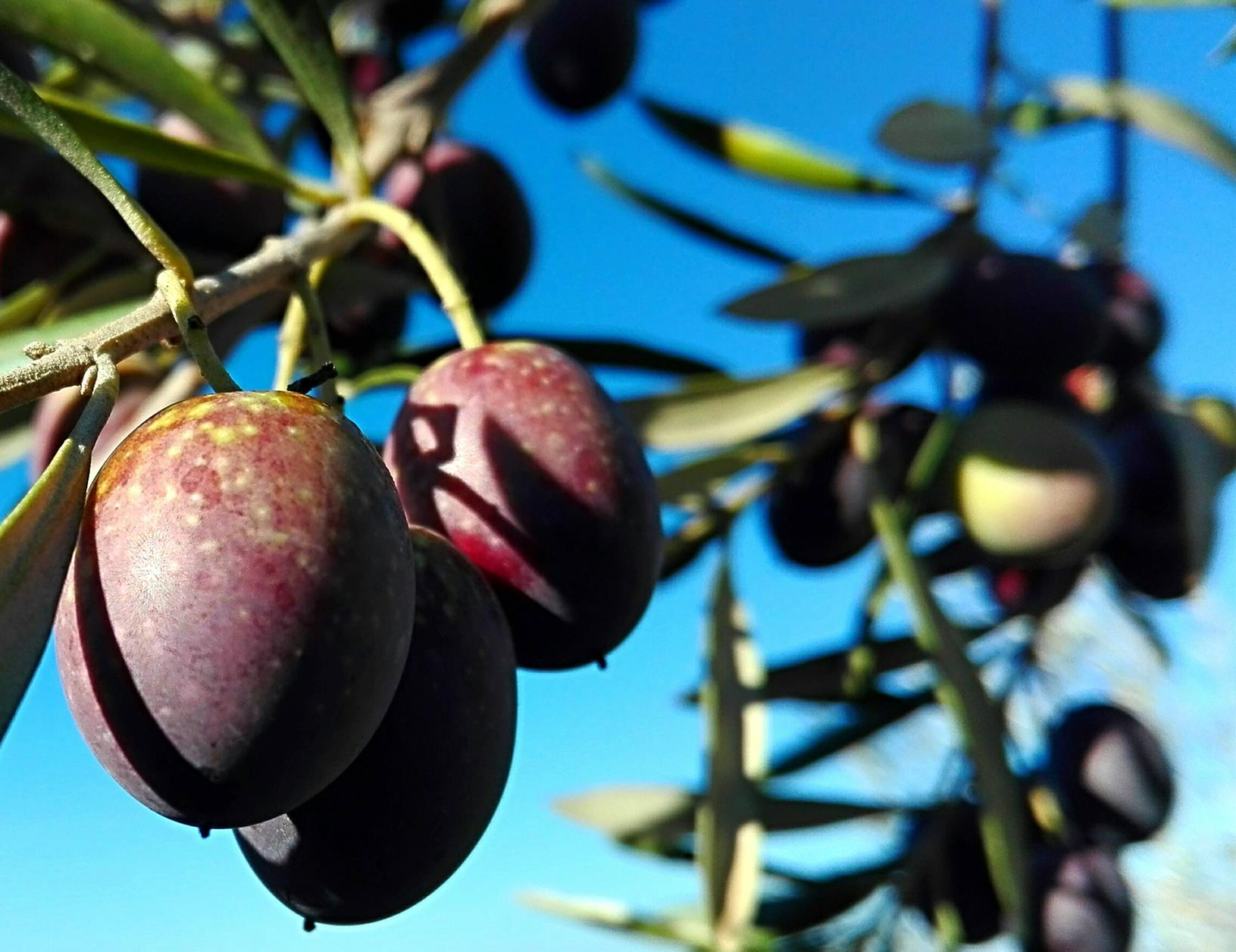 Fotografia d'olives alfafarenques. Presa per Ismael Sempere Sempere